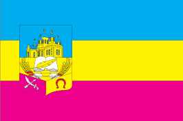 Прапор Козельщинського району